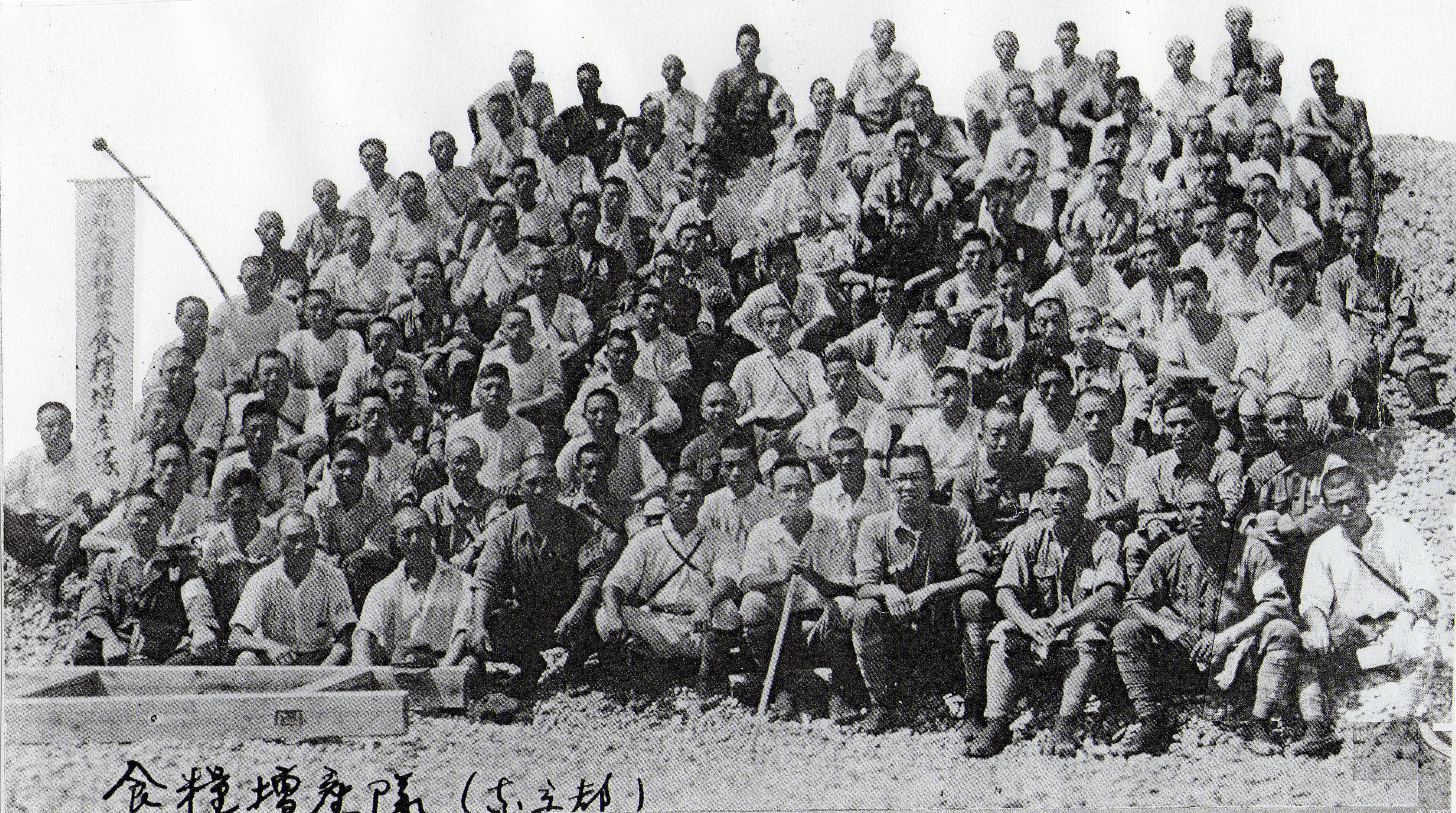 東京よりの食糧増産隊